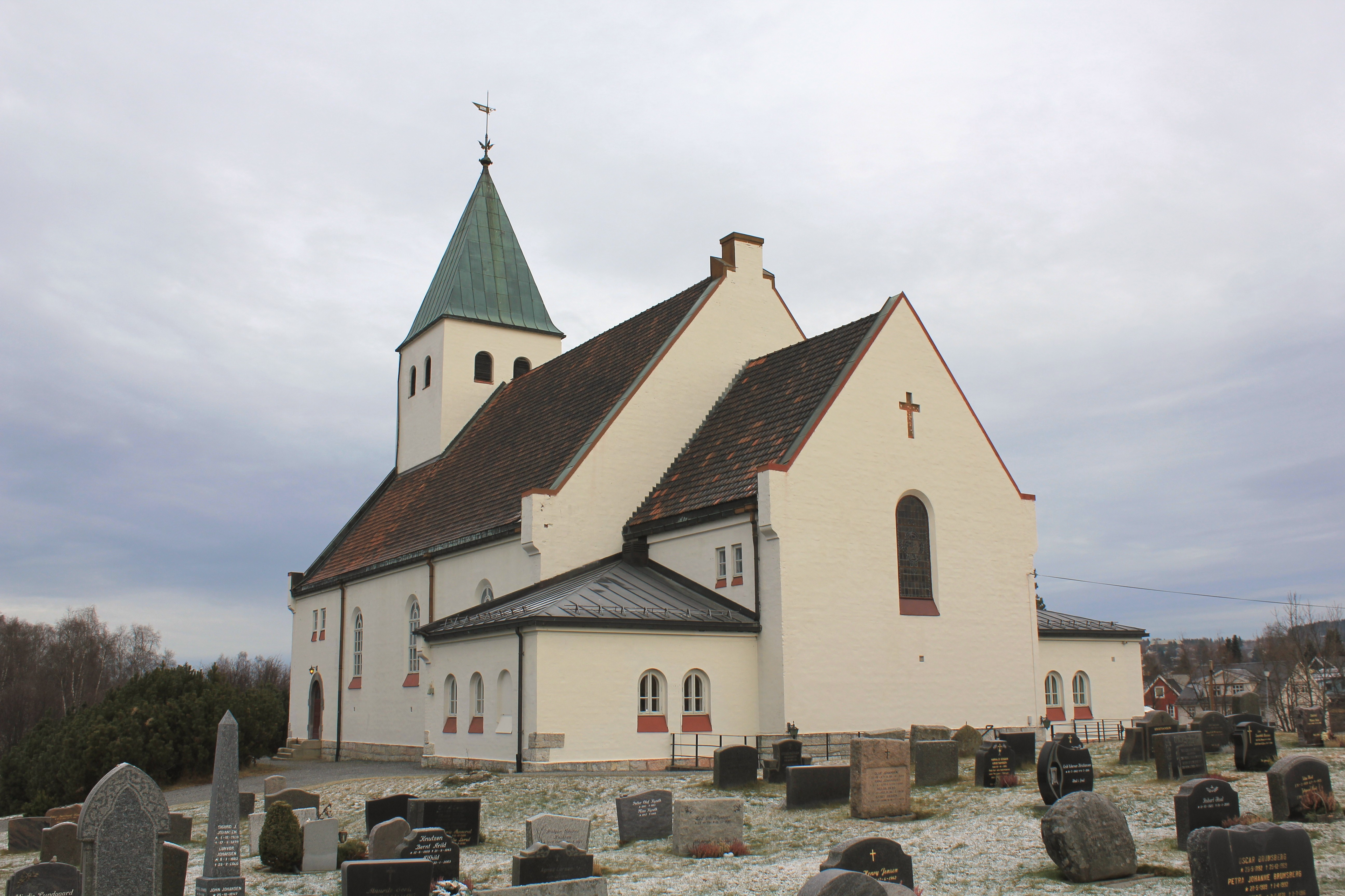 Raufoss kirke.